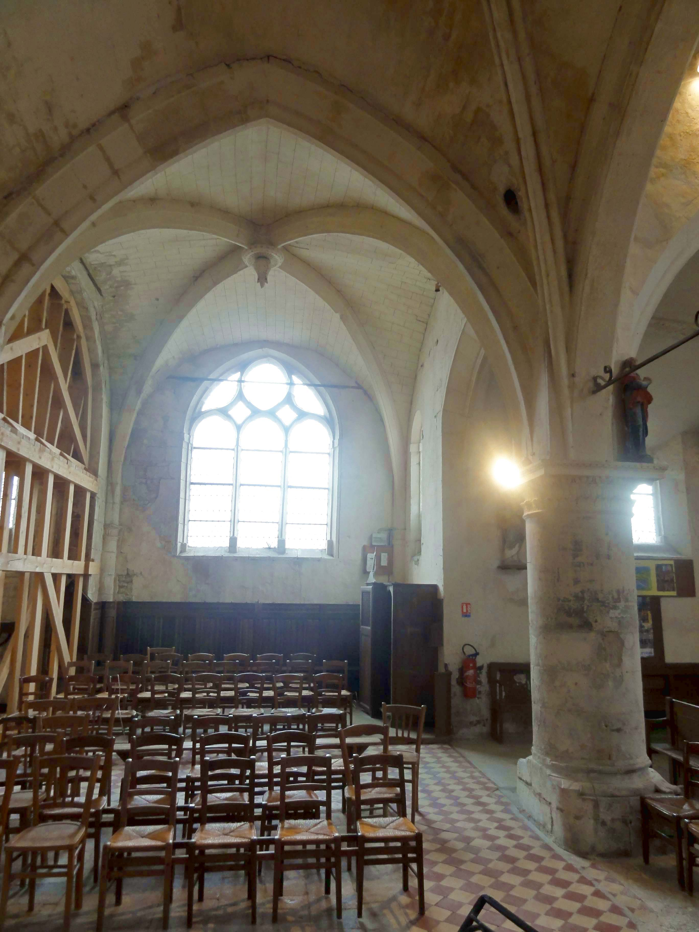 Chœur, 1ère travée, vue vers le sud.